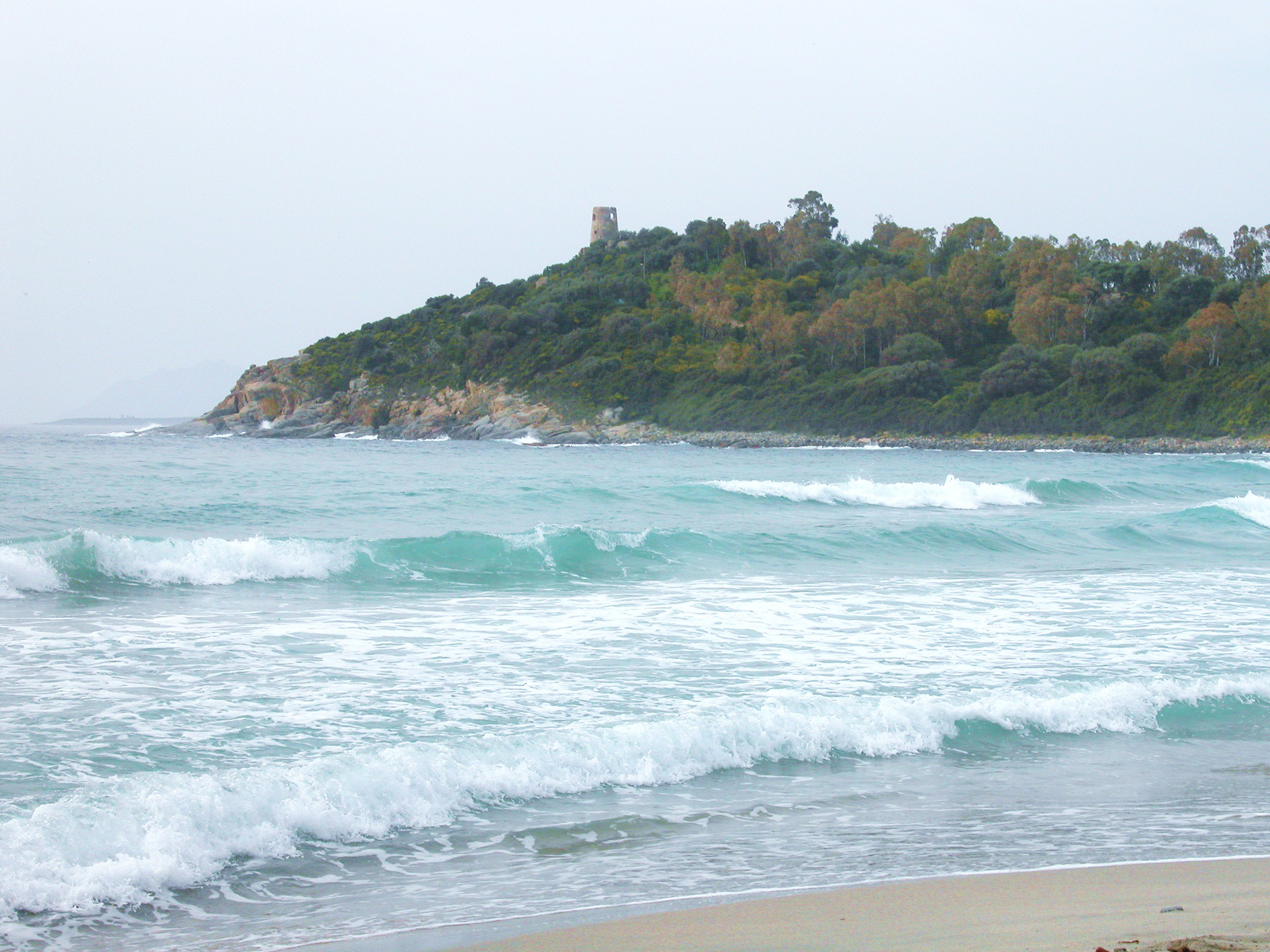 Torre Baia di Porto Frailis